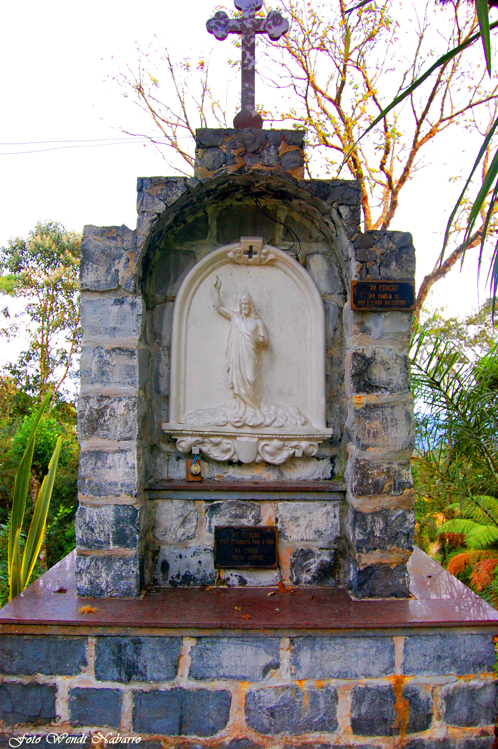 Estação da Via Sacra da Igreja Sagrada Família em Iracema, Itaiópolis, Santa Catarina, Brasil.